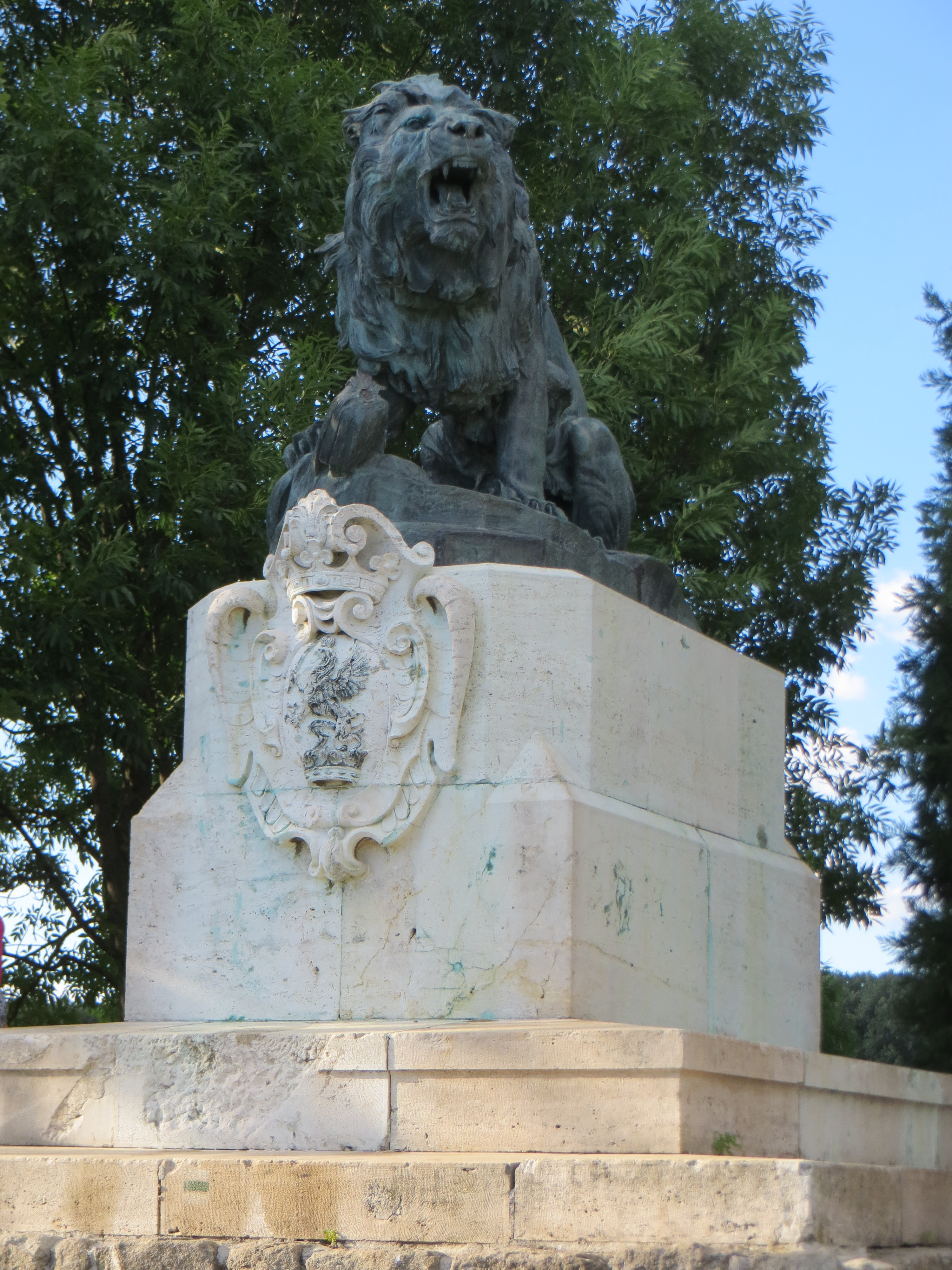 A nagyvezekényi cstában elhúnyt négy Esterházy emlékműve Nagyvezekény határában.